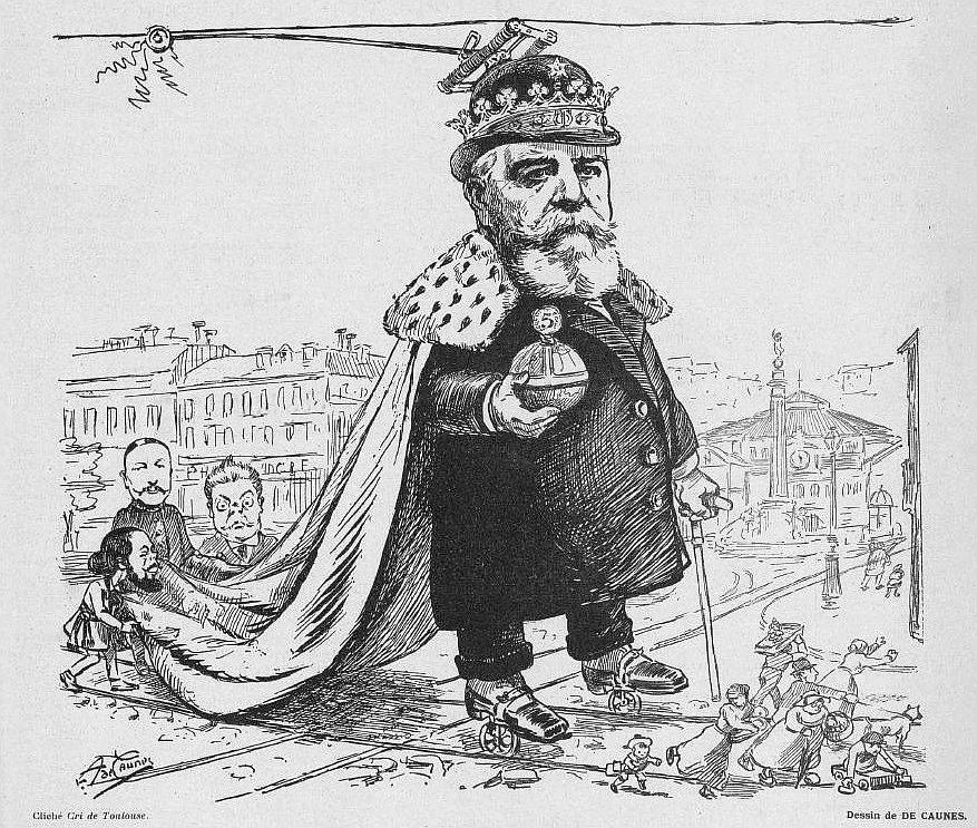 Firmin Pons, dit 'l'empereur Pons', en 1917 (propriétaire des tramways de Toulouse).